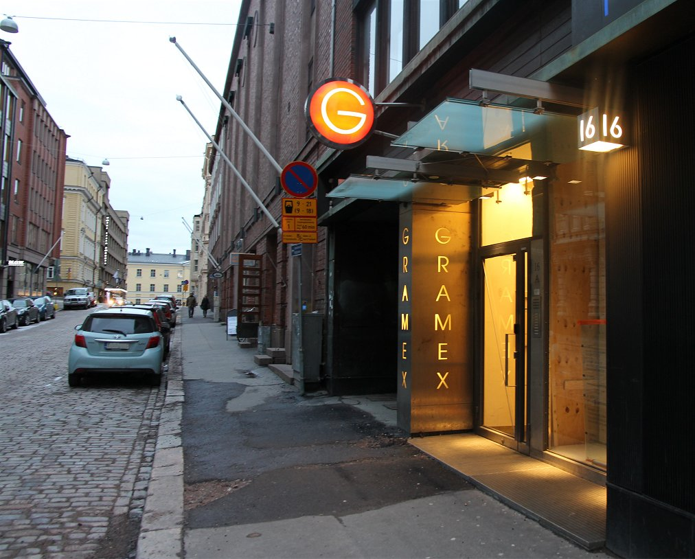 Sisäänkäynti Gramex ry.n tiloihin Helsingissä. Gramex on muusikoiden, solistien, kapellimestarien ja äänitteiden tuottajien oikeuksien valvomiseksi perustettu tekijänoikeusjärjestö.